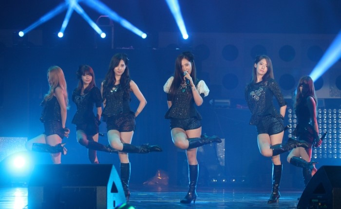 2012년 7월 12일 여수 엑스포 팝 페스티벌에서 소녀시대.